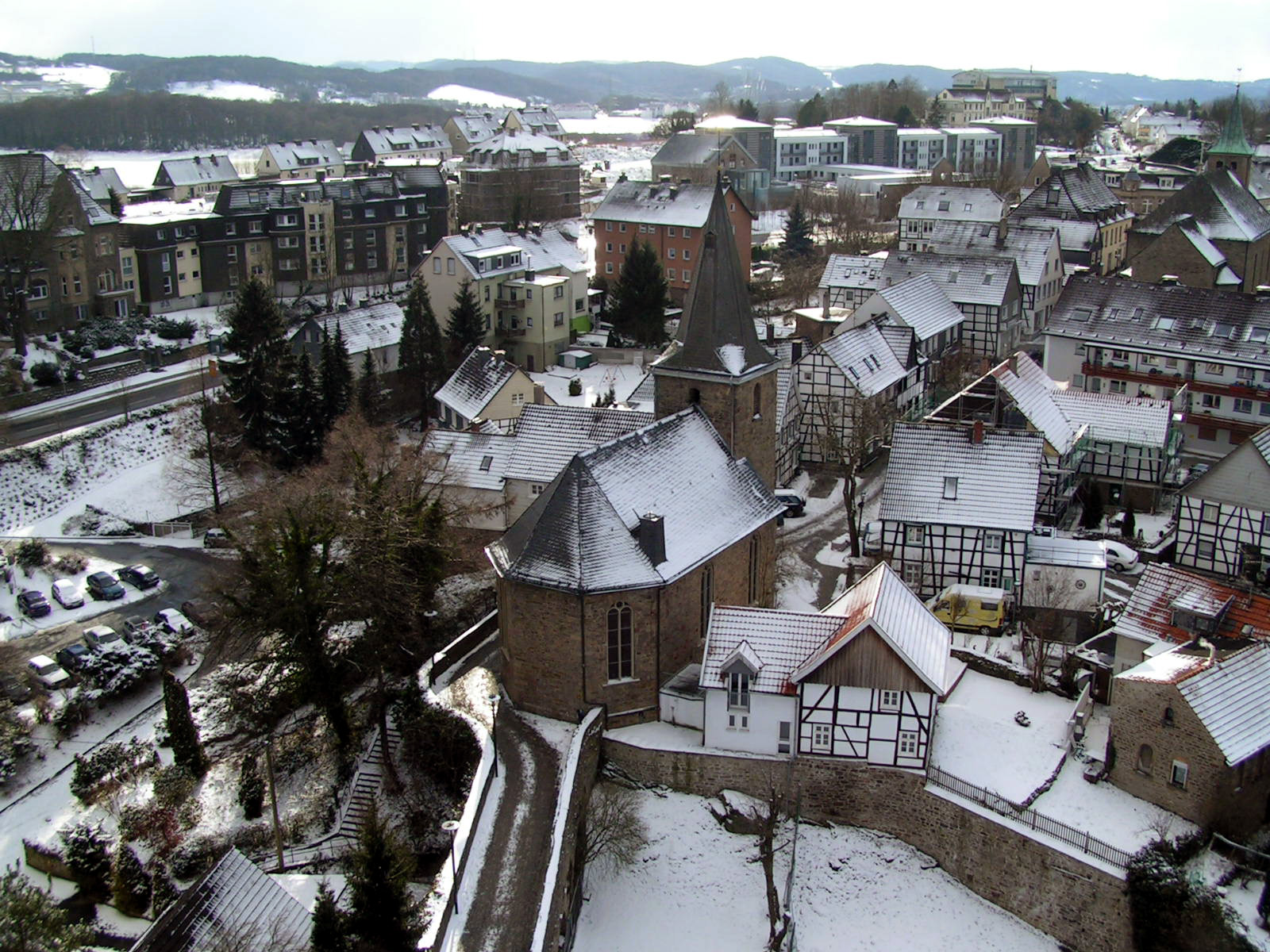 Blick von der Burg Blankenstein auf den historischen Dorfkern von Blankenstein, seit 1975 Stadtteil von Hattingen A view to the historic town center of Blankenstein, a part of the city Hattingen in the Ruhr Area Date: Feb 2005, Hattingen, Germany Author: Maschinenjunge Licence: cc-by-sa-2.5 Hattingen-Blankenstein